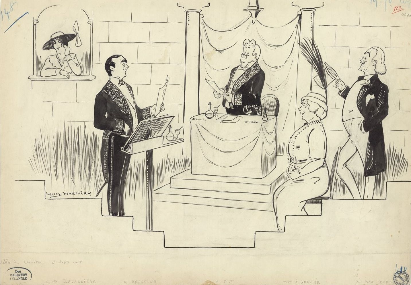 L'Habit vert, pièce de théâtre de Robert de Flers et Gaston Arman de Caillavet, dessin de Yves Marevéry